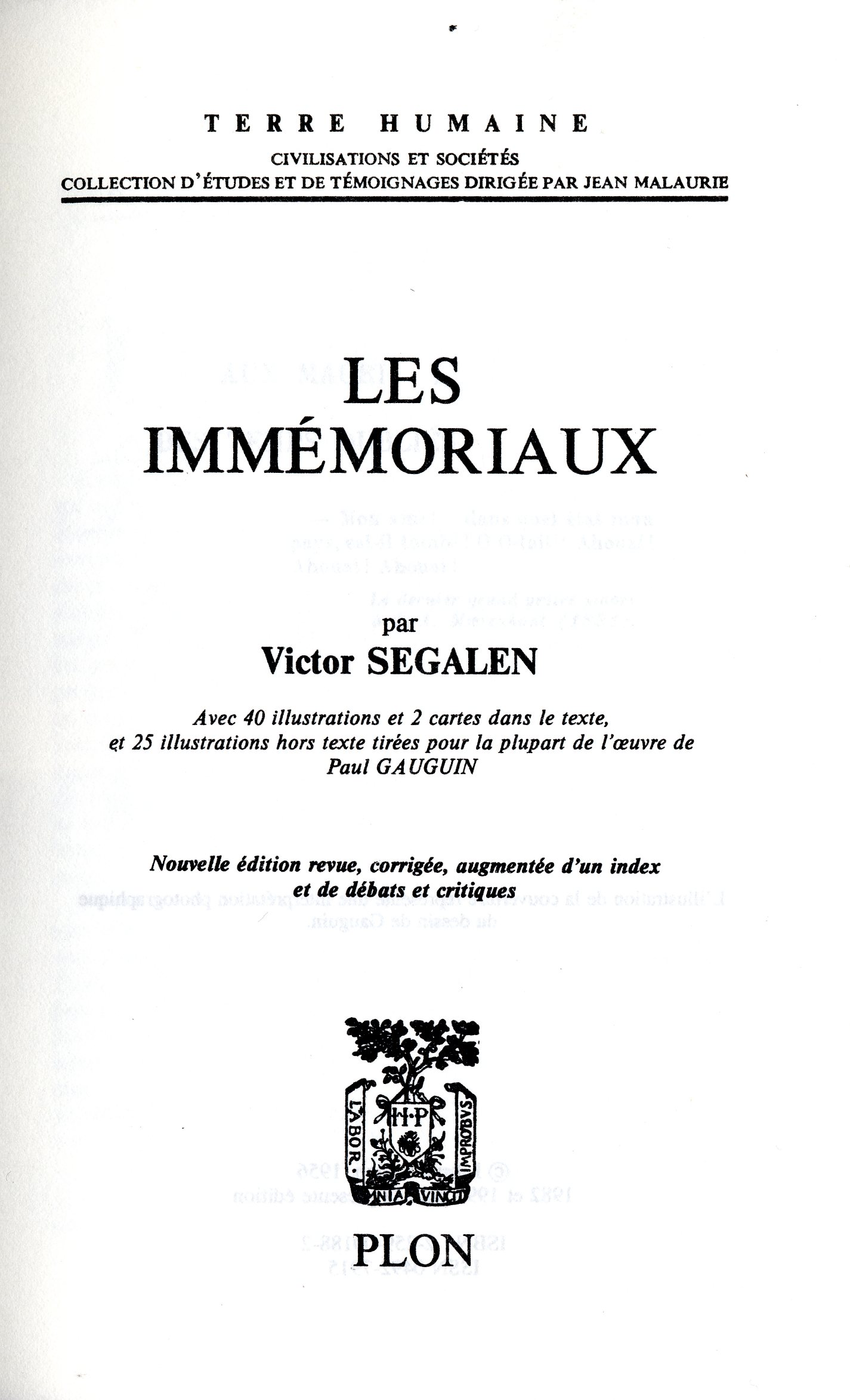 La page de titre des Immémorieux de Victor Segalen